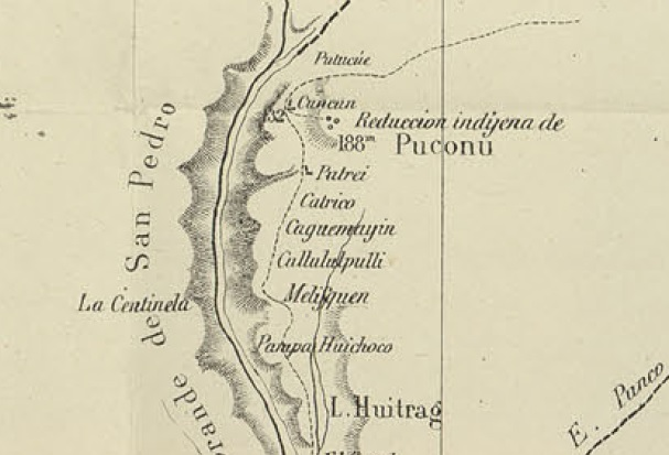 Reducción Indígena de Puconu en el Mapa de la Expedición de Francisco Vidal Gormaz1869